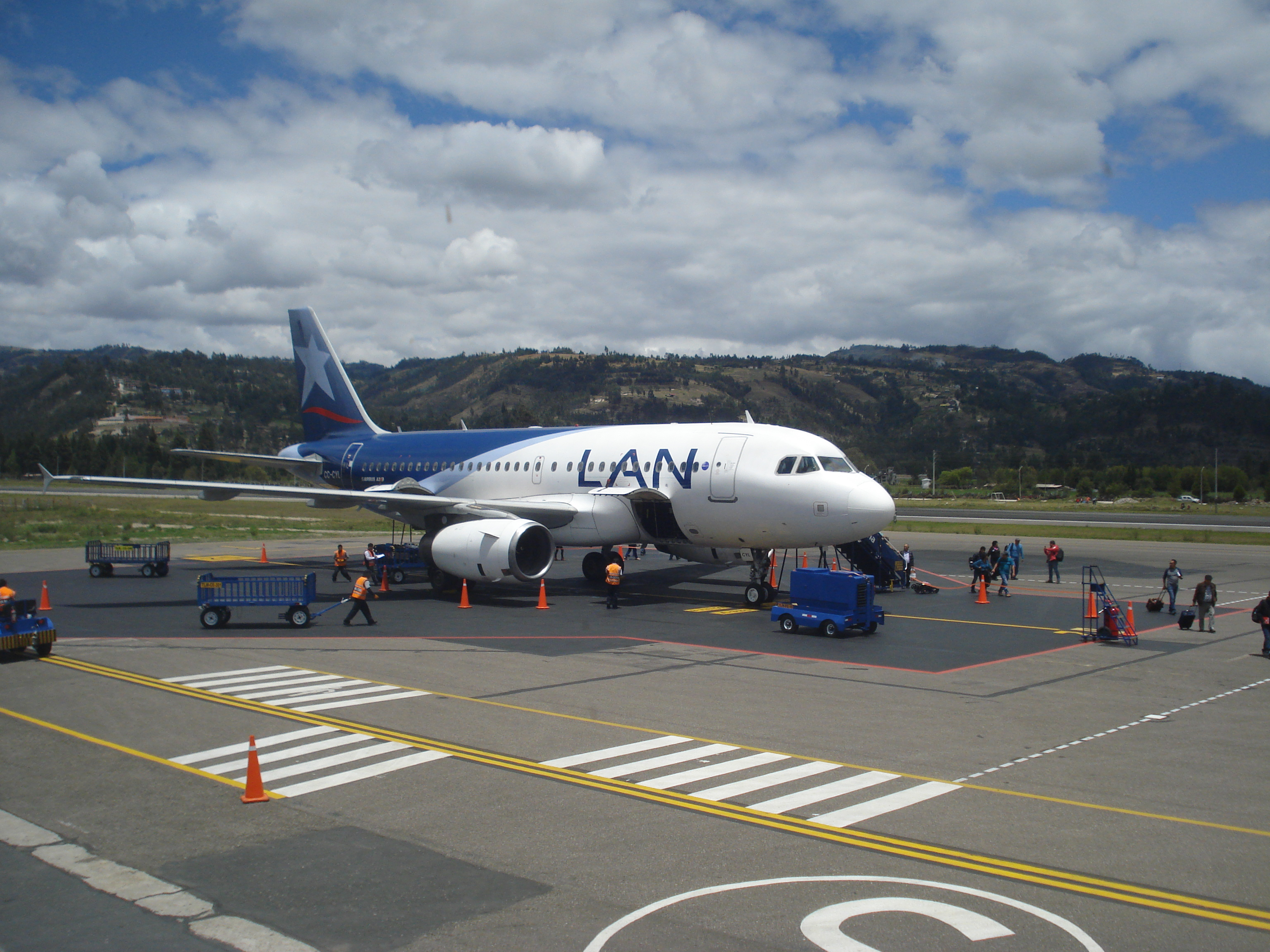 Desembarque de pasajeros de un avión Airbus A319 perteneciente a la empresa LATAM, en el Aeropuerto Mayor General FAP Armando Revoredo Iglesias de la Ciudad de Cajamarca, al medio día.